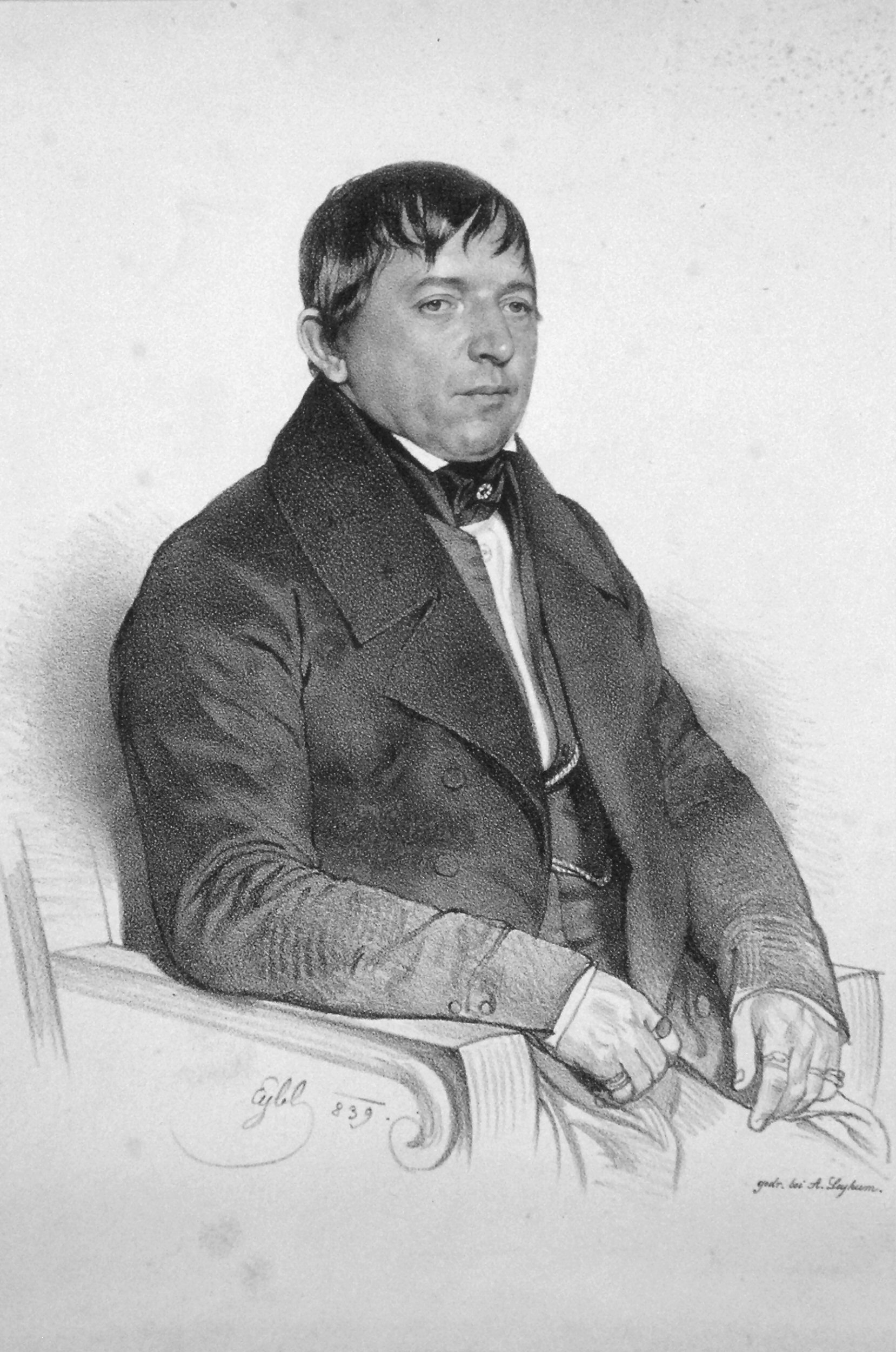 Andreas Töpper (1786-1872), österreichischer Industrieller. Lithographie von Franz Eybl, 1839